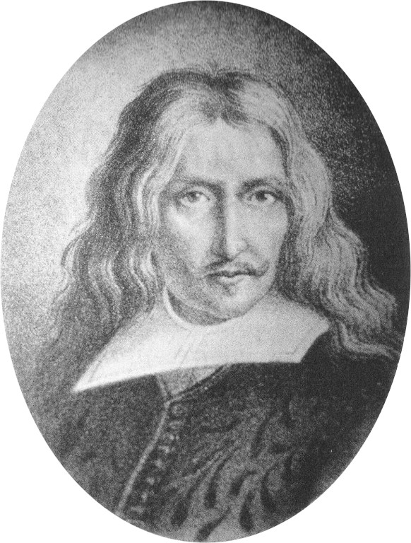 Ritratto di Carlo Maria Maggi